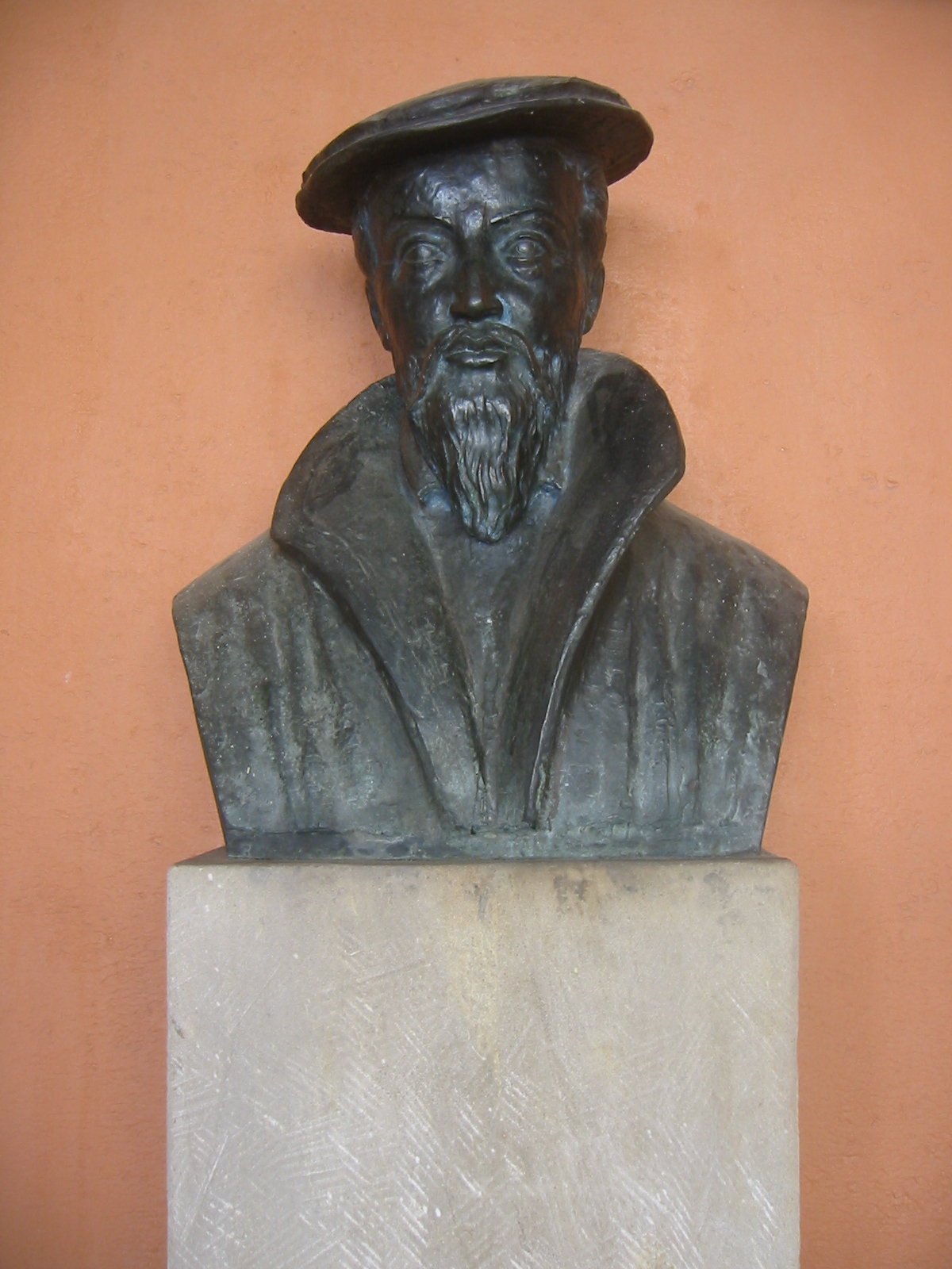 Gedenkstele für Georgius Agricola in der Chemnitzer Altstadt